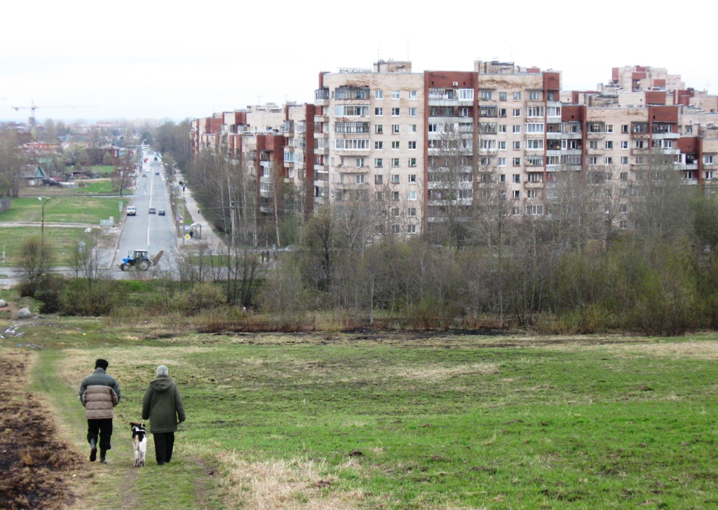 23-й квартал Старого Петергофа - самый населённый район Петергофа. Вид с Троицкой горы. В перспективу уходит Чичеринская улица.